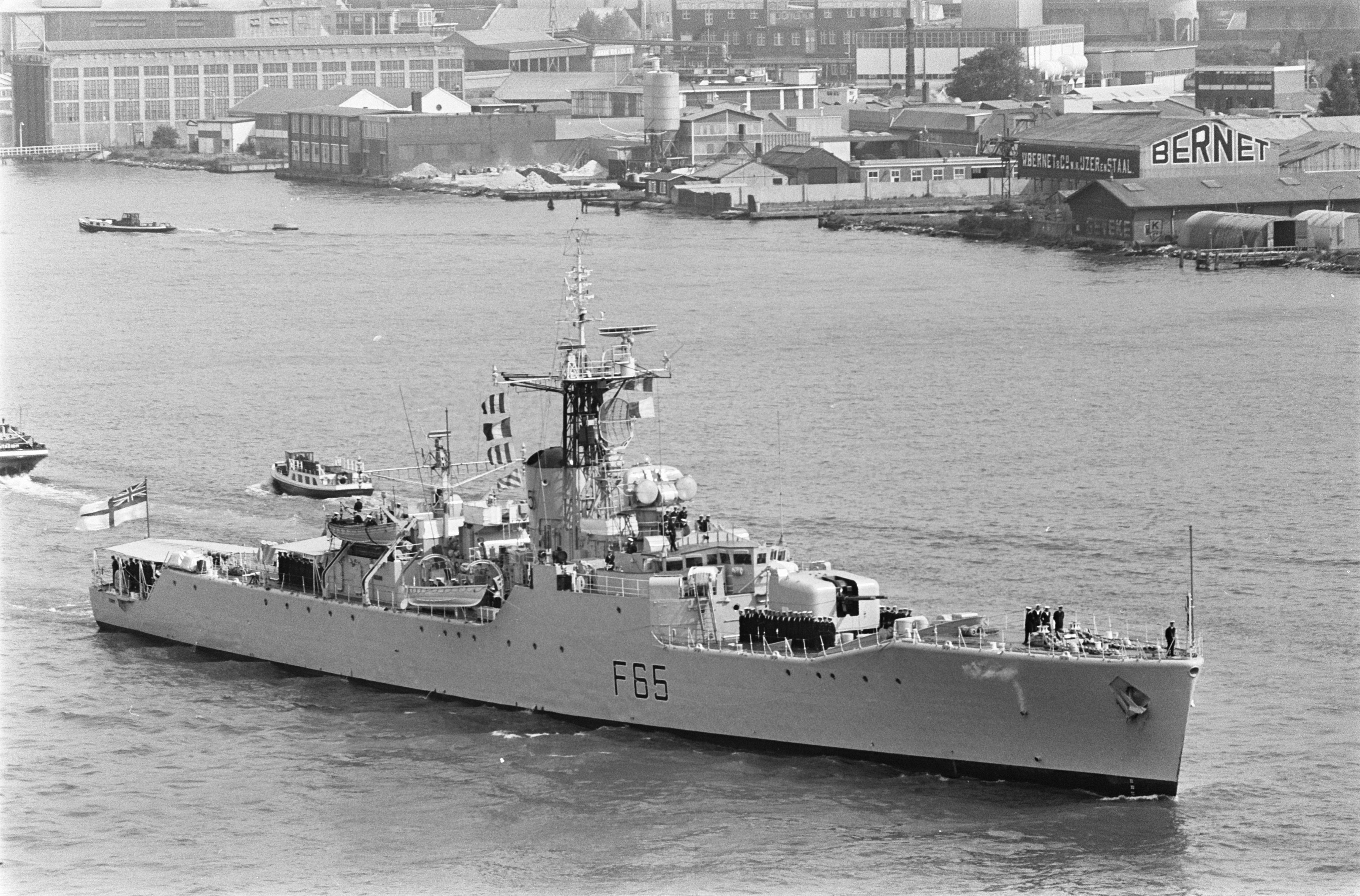 Collectie / Archief : Fotocollectie Anefo Reportage / Serie : [ onbekend ] Beschrijving : Brits vlootbezoek aan Amsterdam twee van de drie fregatten op het IJ Datum : 23 mei 1969 Locatie : Amsterdam, IJ Trefwoorden : fregatten, vlootbezoeken Fotograaf : Evers, Joost / Anefo Auteursrechthebbende : Nationaal Archief Materiaalsoort : Negatief (zwart/wit) Nummer archiefinventaris : bekijk toegang 2.24.01.05 Bestanddeelnummer : 922-4544